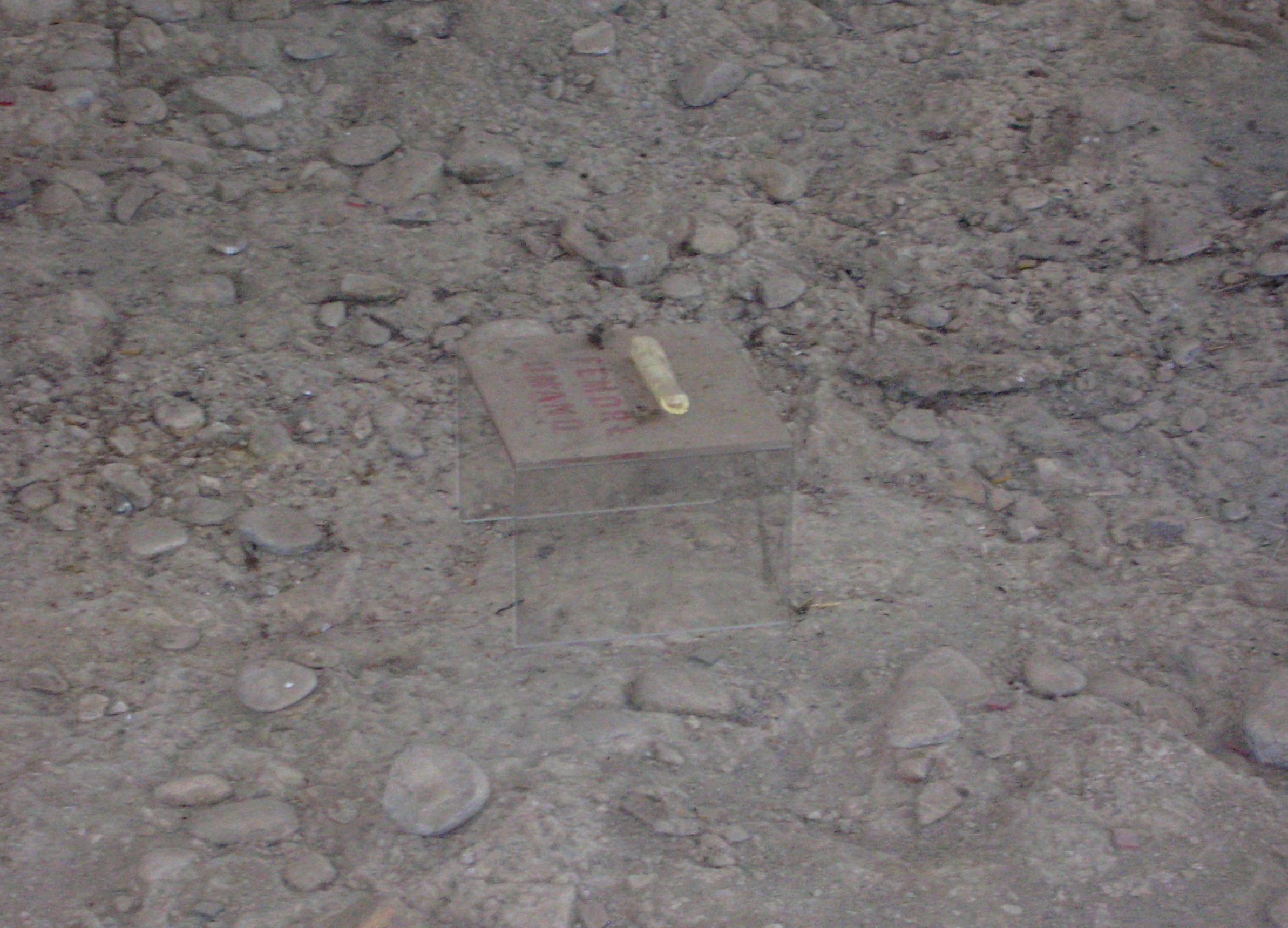 Femore di Homo Erectus a Notarchirico, Venosa (PZ)